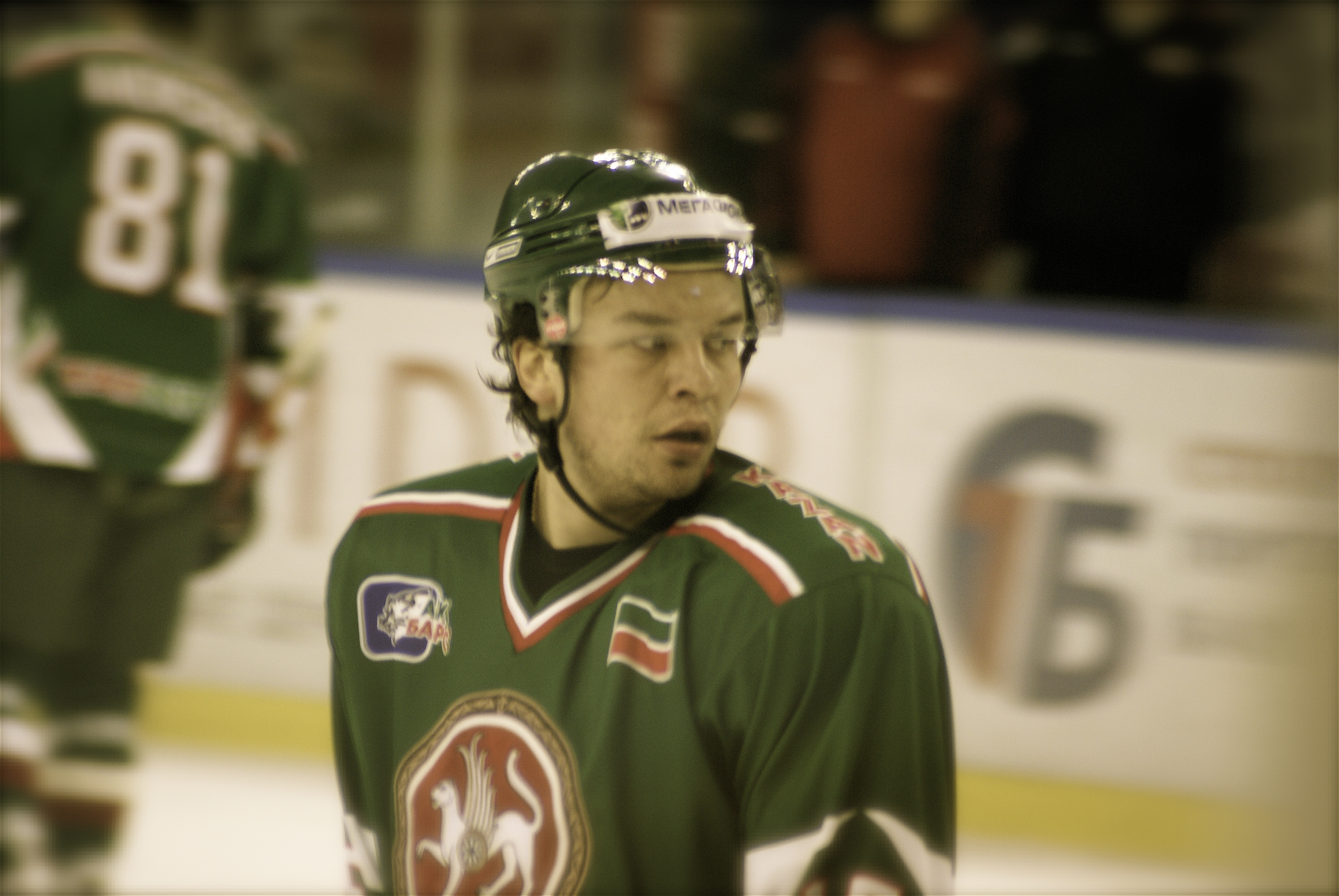 Григорий Шафигулин АК БАРС